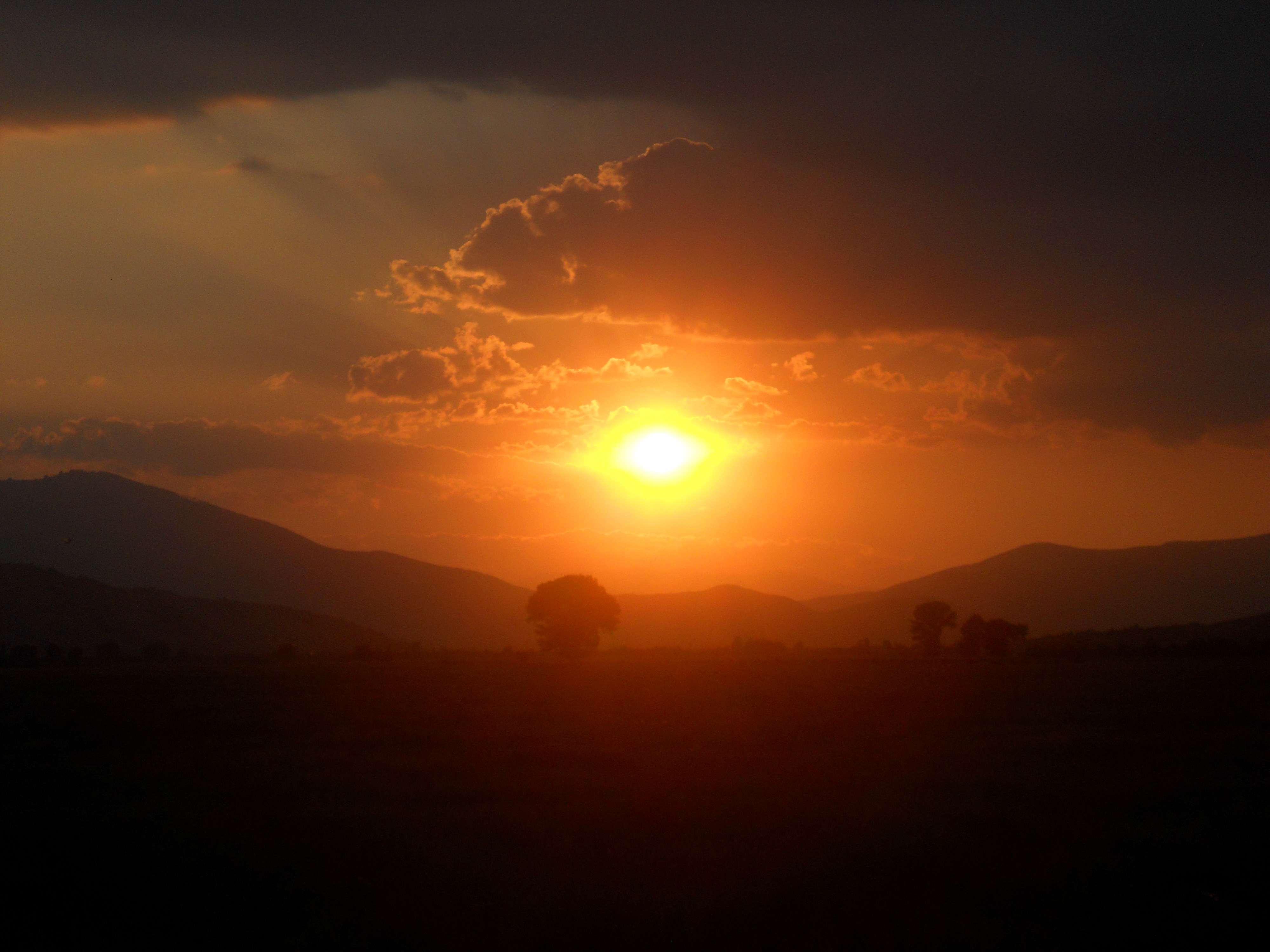 Sunset in Erekovci